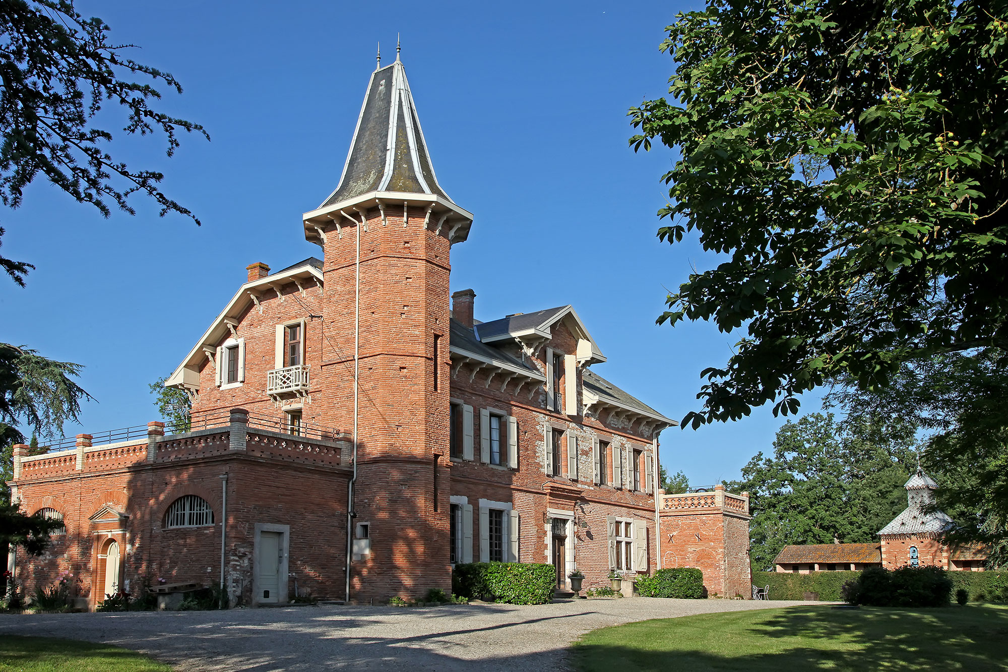 Chateau du Buc